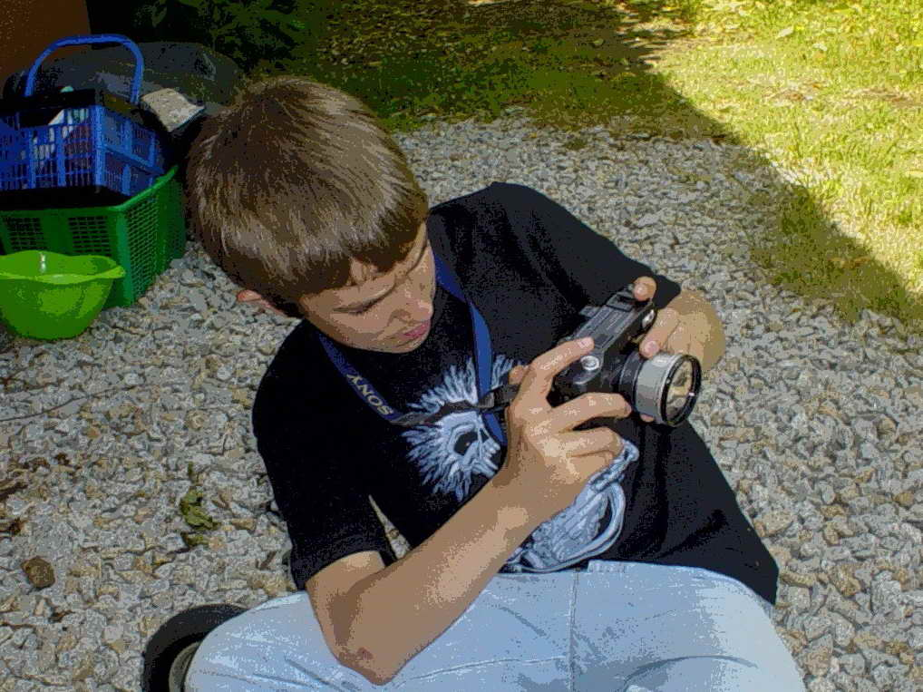 self made